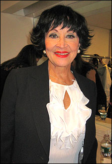 Chita Rivera